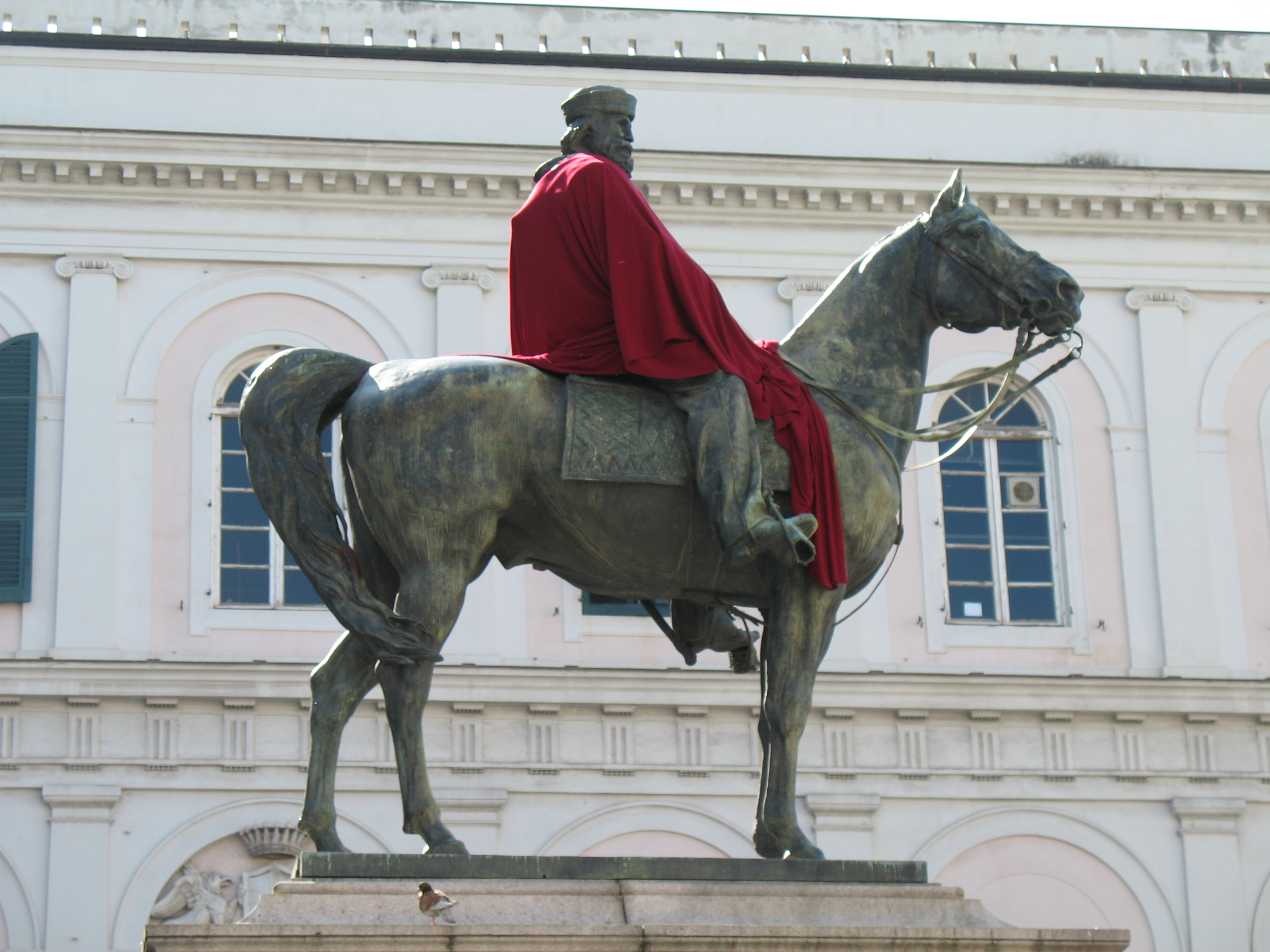 Statua equestre dedicata a Giuseppe Garibaldi a piazza De Ferrari, Genova